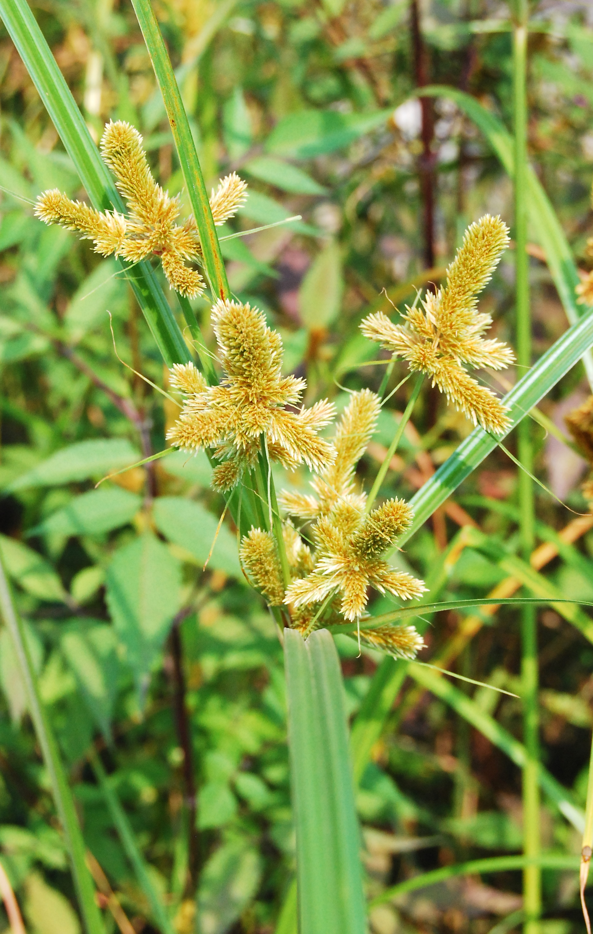 奥林匹克森林公园